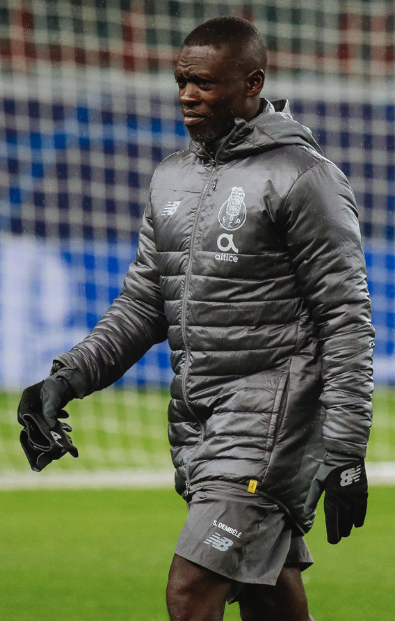 Икер Касильяс вместе с «Порту» готовится к матчу с «Локомотивом»